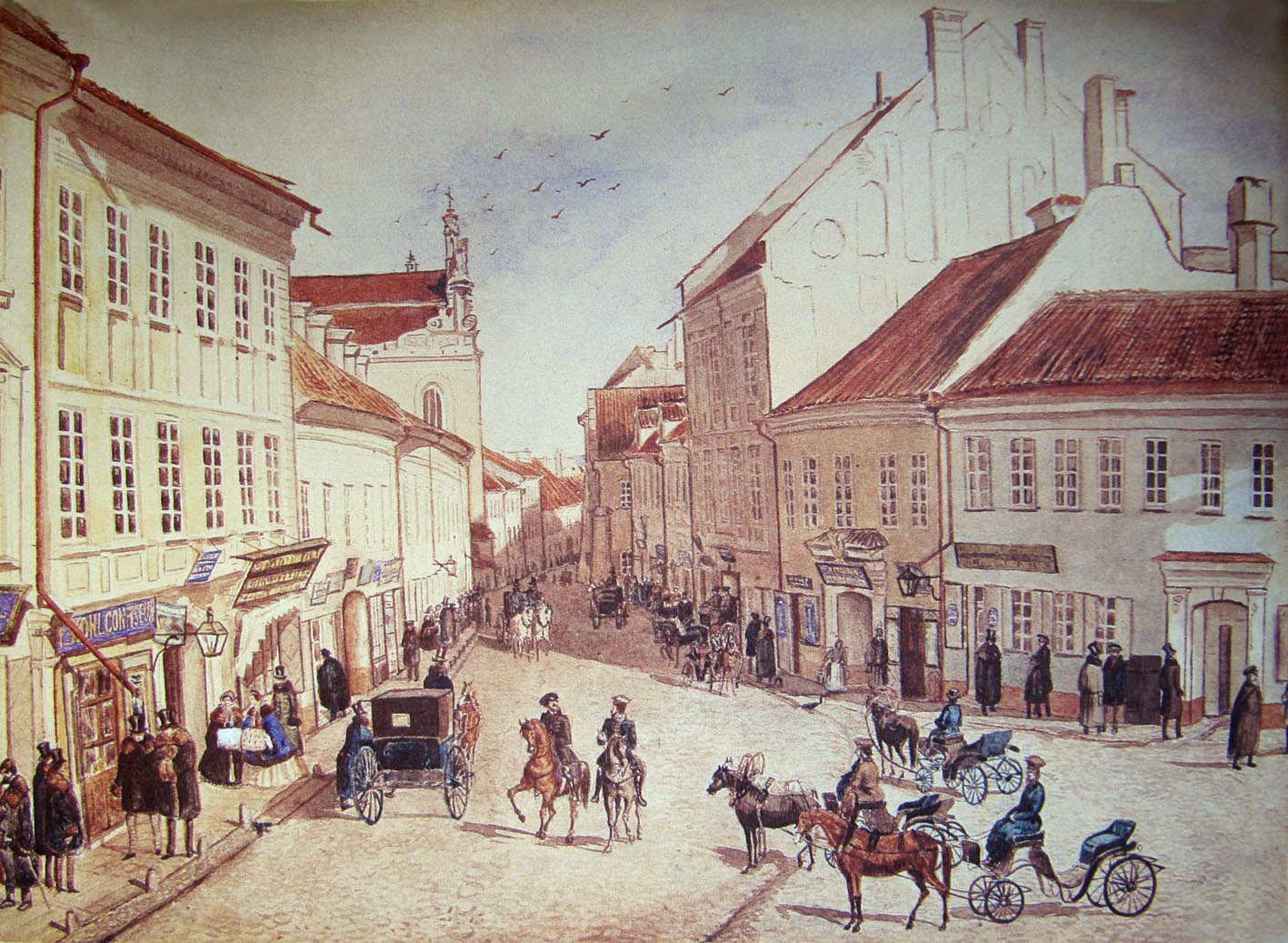 Беларуская (тарашкевіца): Вільня (Vilnia), вуліца Замкавая (vulica Zamkavaja)